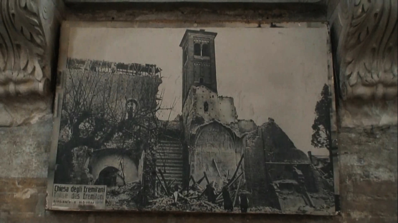 Padova - Chiesa degli Eremitani Foto fatta da immagine conservata all'interno della chiesa